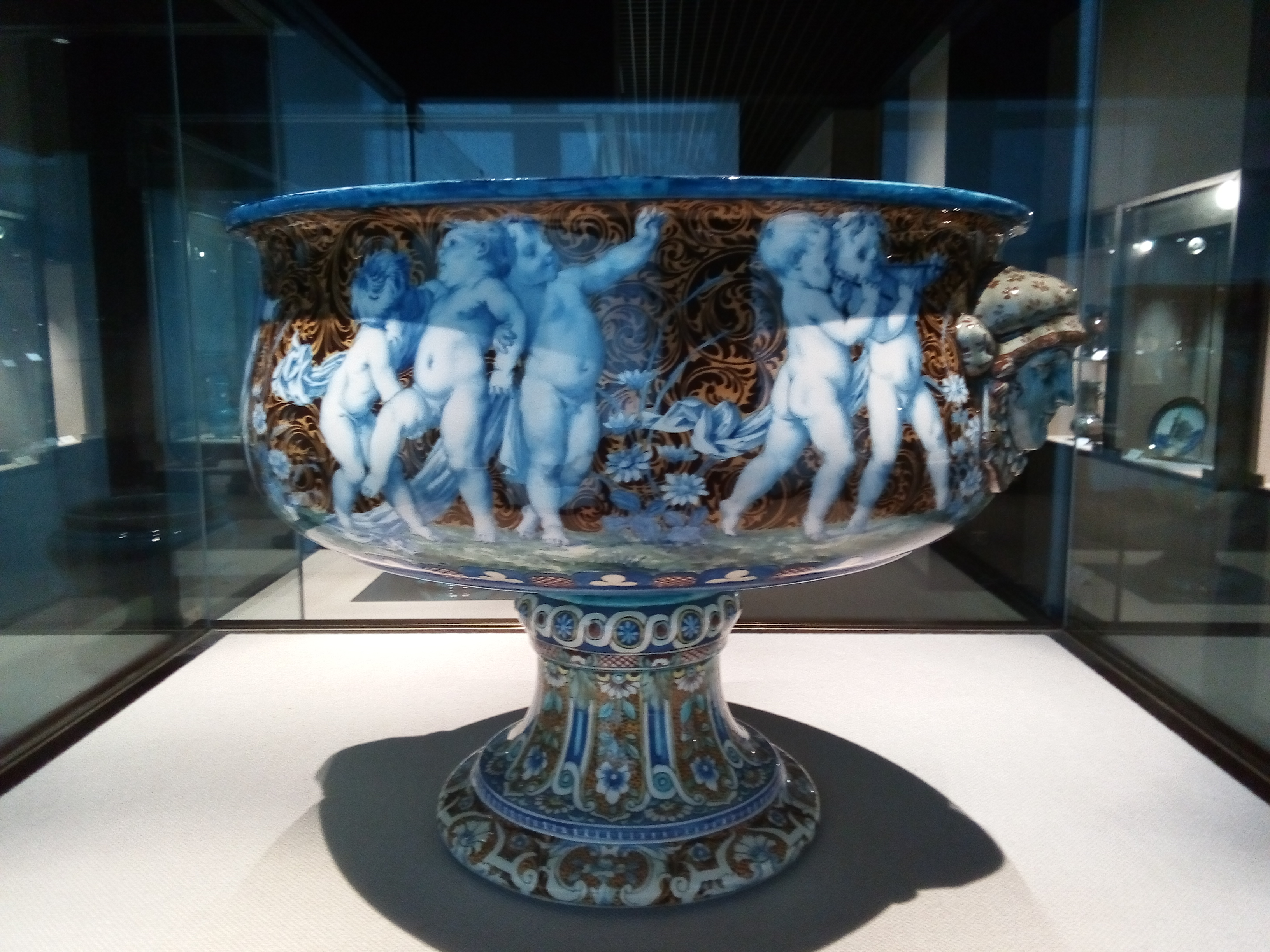 Coupe aux amours, peinte par Jules Legrain